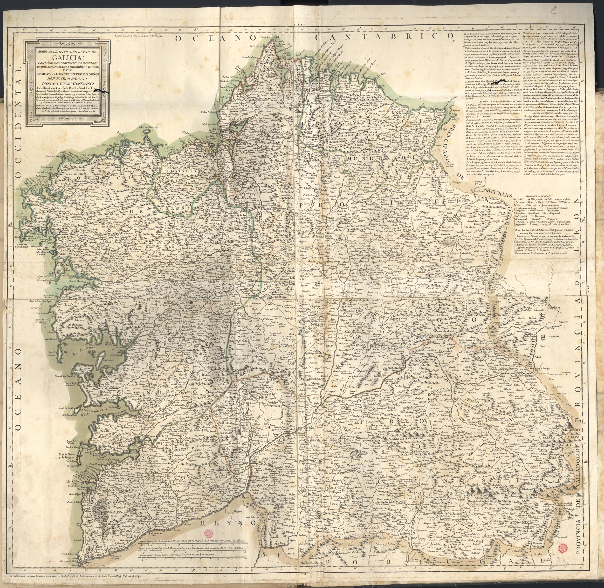 Mapa geográfico del Reyno de Galicia (año 1784).